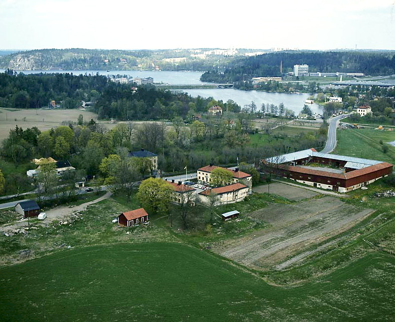 Fittja gård från sydväst med Albysjön i bakgrunden.